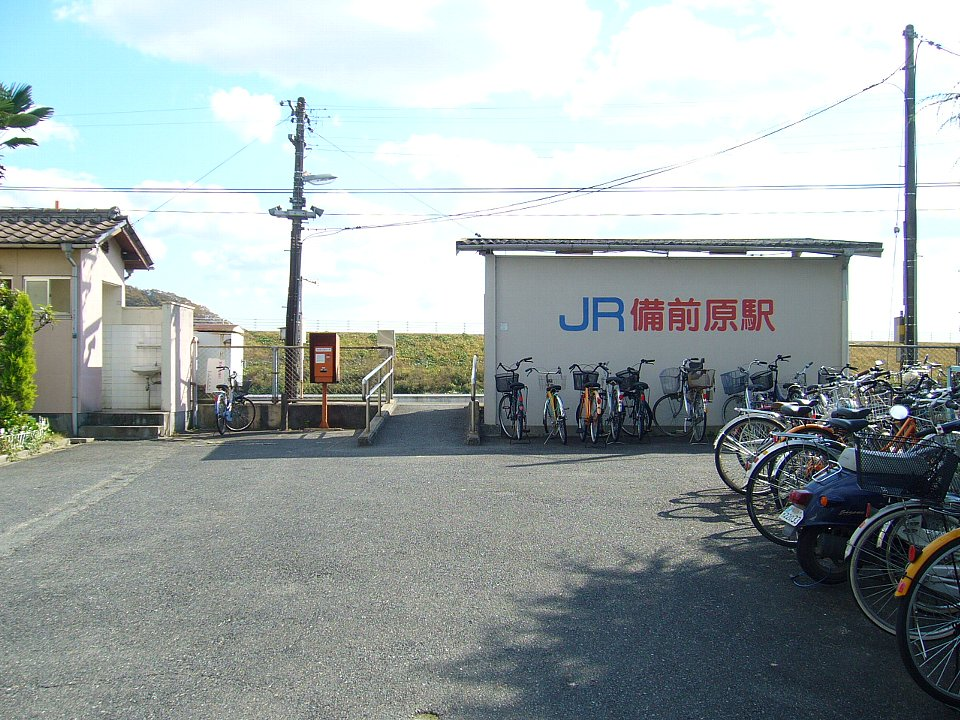 津山線備前原駅